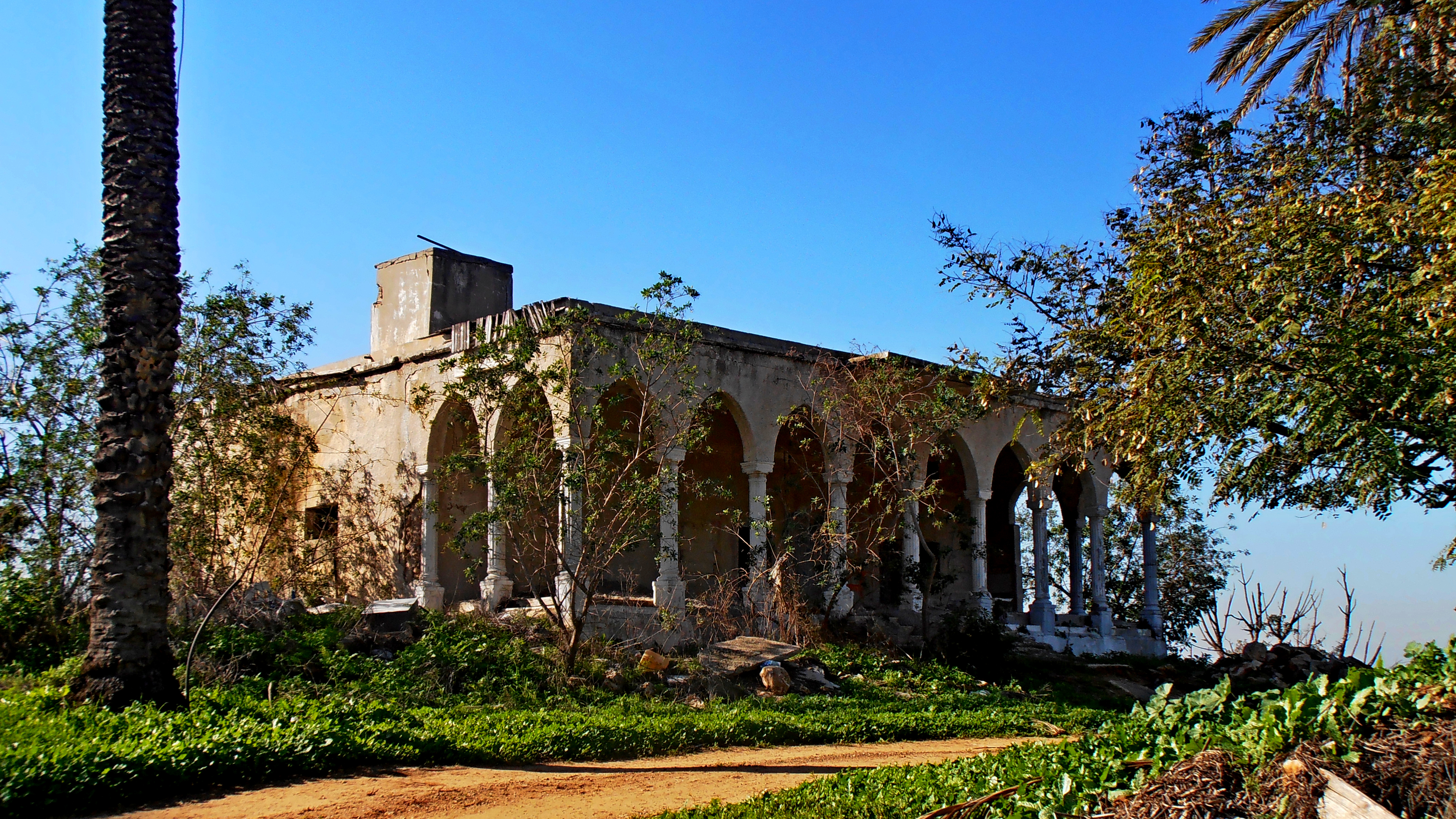 Tell Shalaf; Shfela, Israel תל שלף; שפלת יהודה